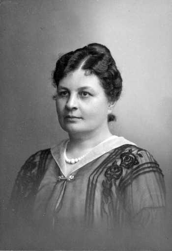 Maissi Erkko Kuva: Päivälehden arkisto